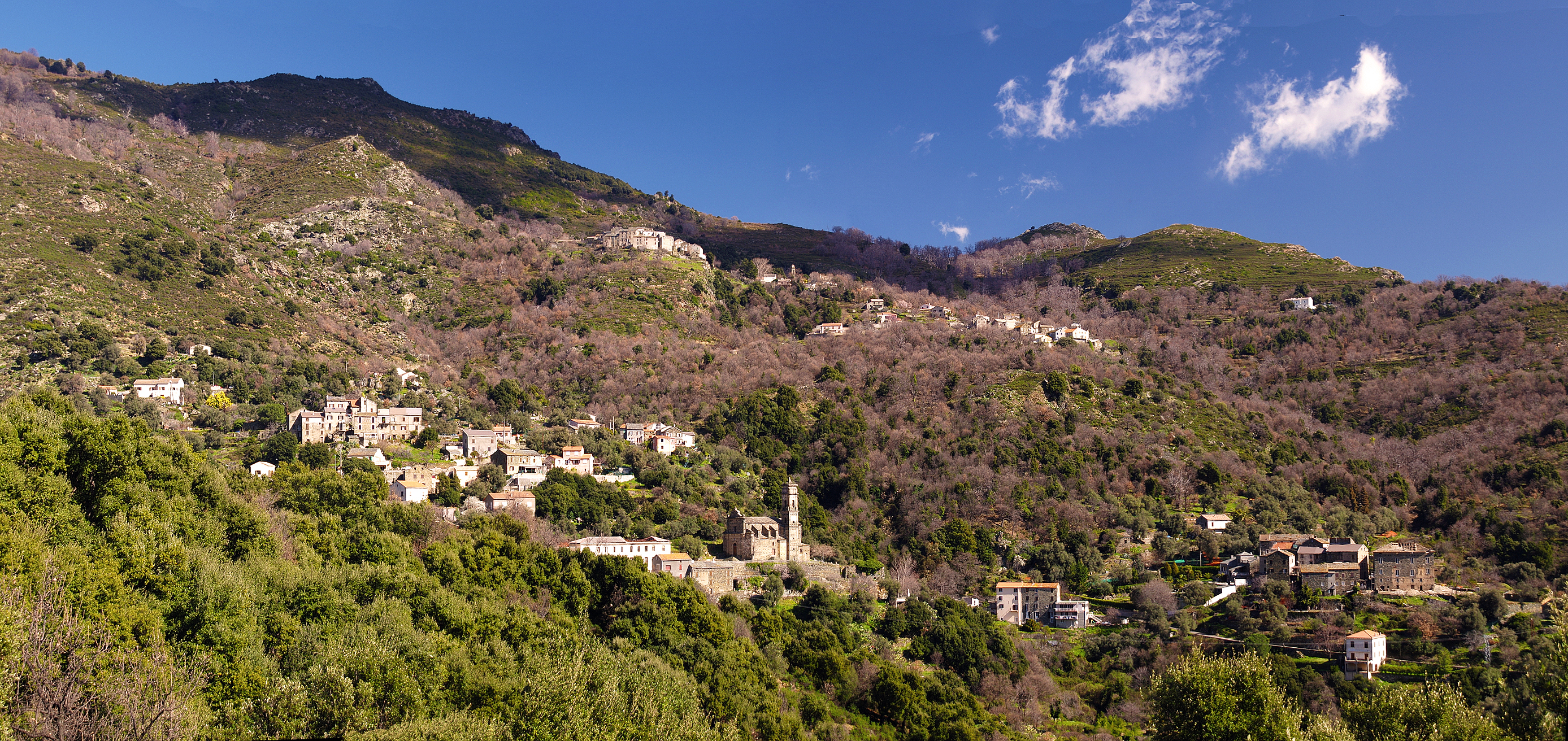 Villages de Volpajola et Scolca (en haut)